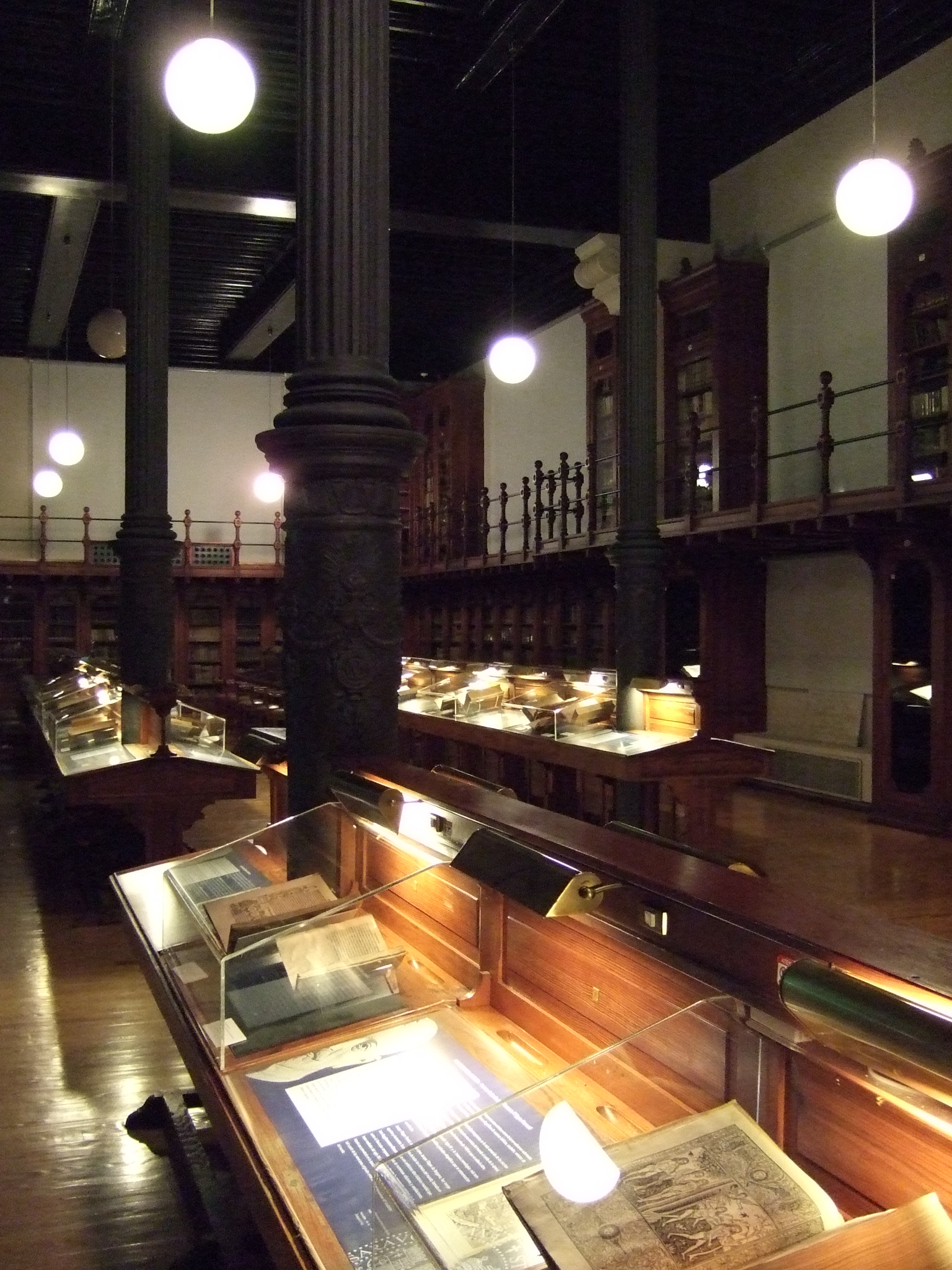 Zaragoza - Paraninfo - Biblioteca